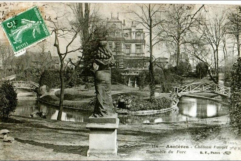 Asnières-sur-Seine.Château Pouget.Parc Voyer d'Argenson